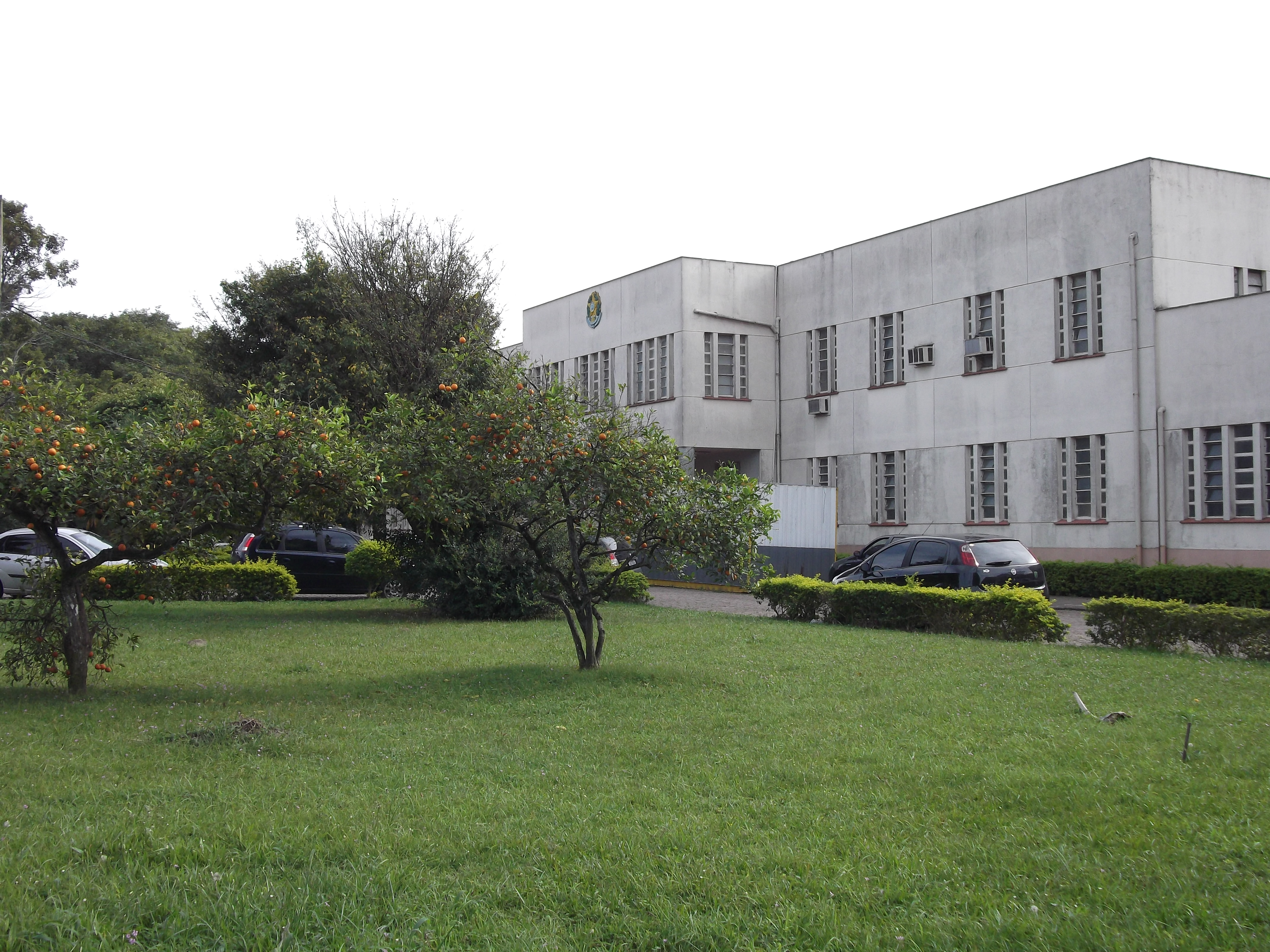 Hospital de Clínicas Veterinárias da Universidade Federal do Rio Grande do Sul